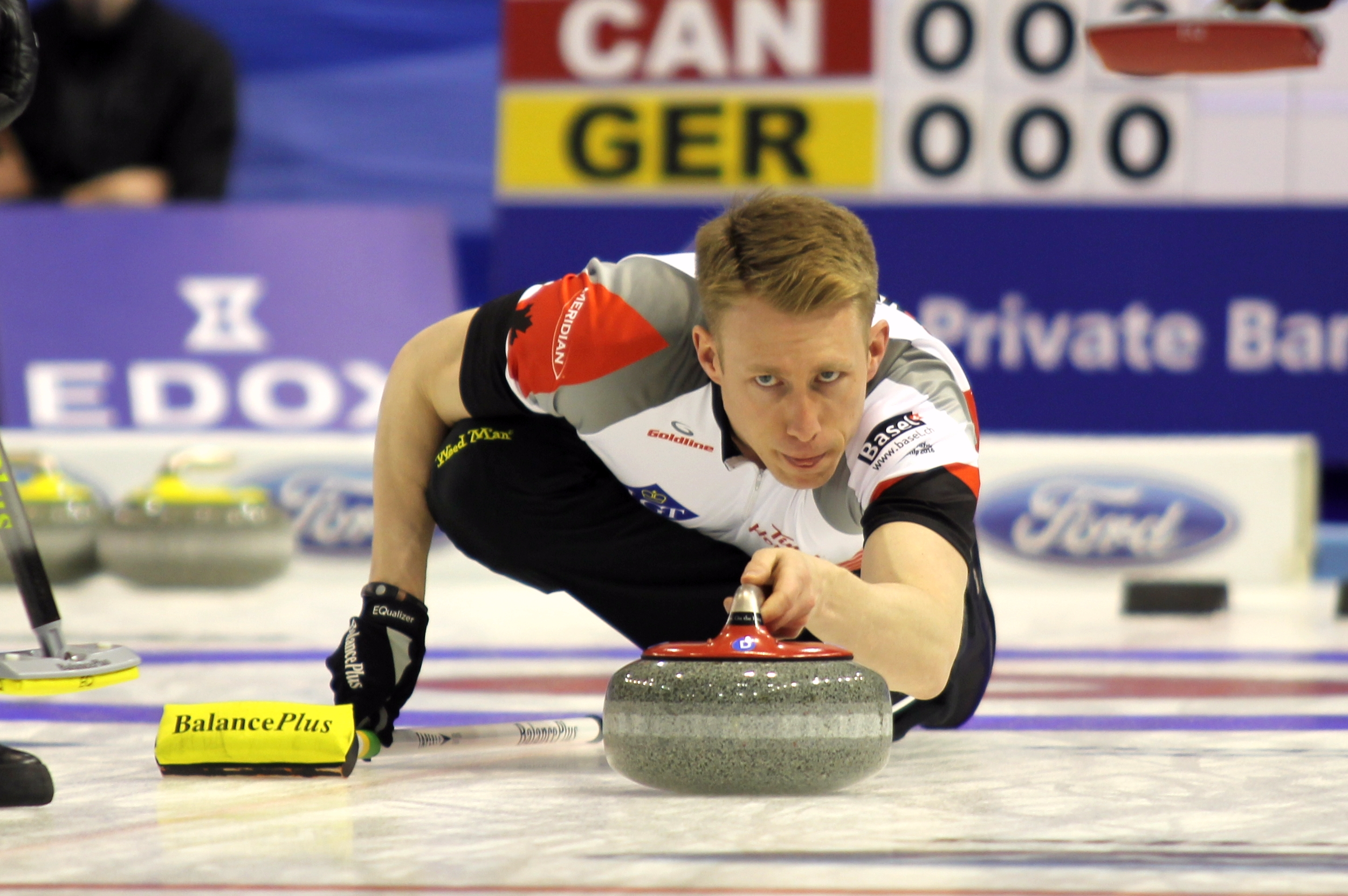 Marc Kennedy (CAN).